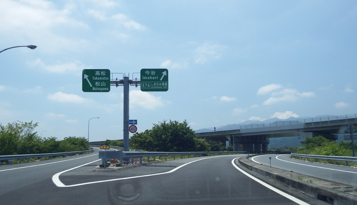 東予丹原インターチェンジ